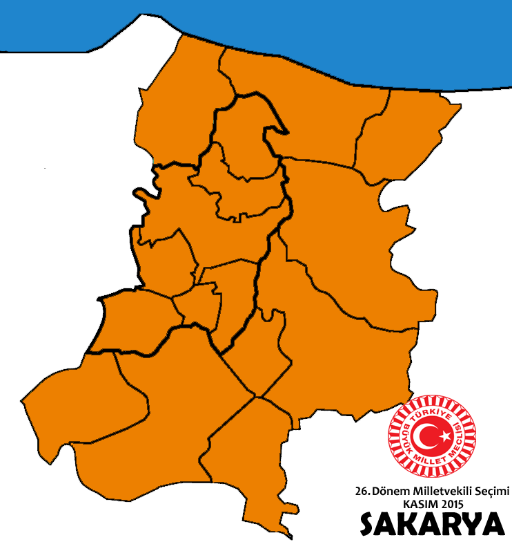 Kasım 2015 Seçimleri